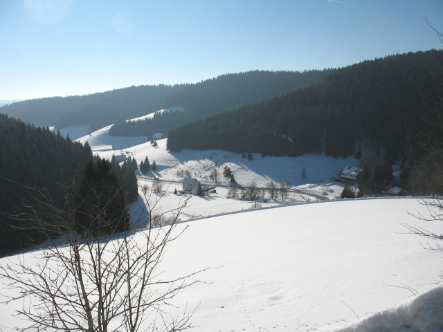 Blick nach Schützenbach